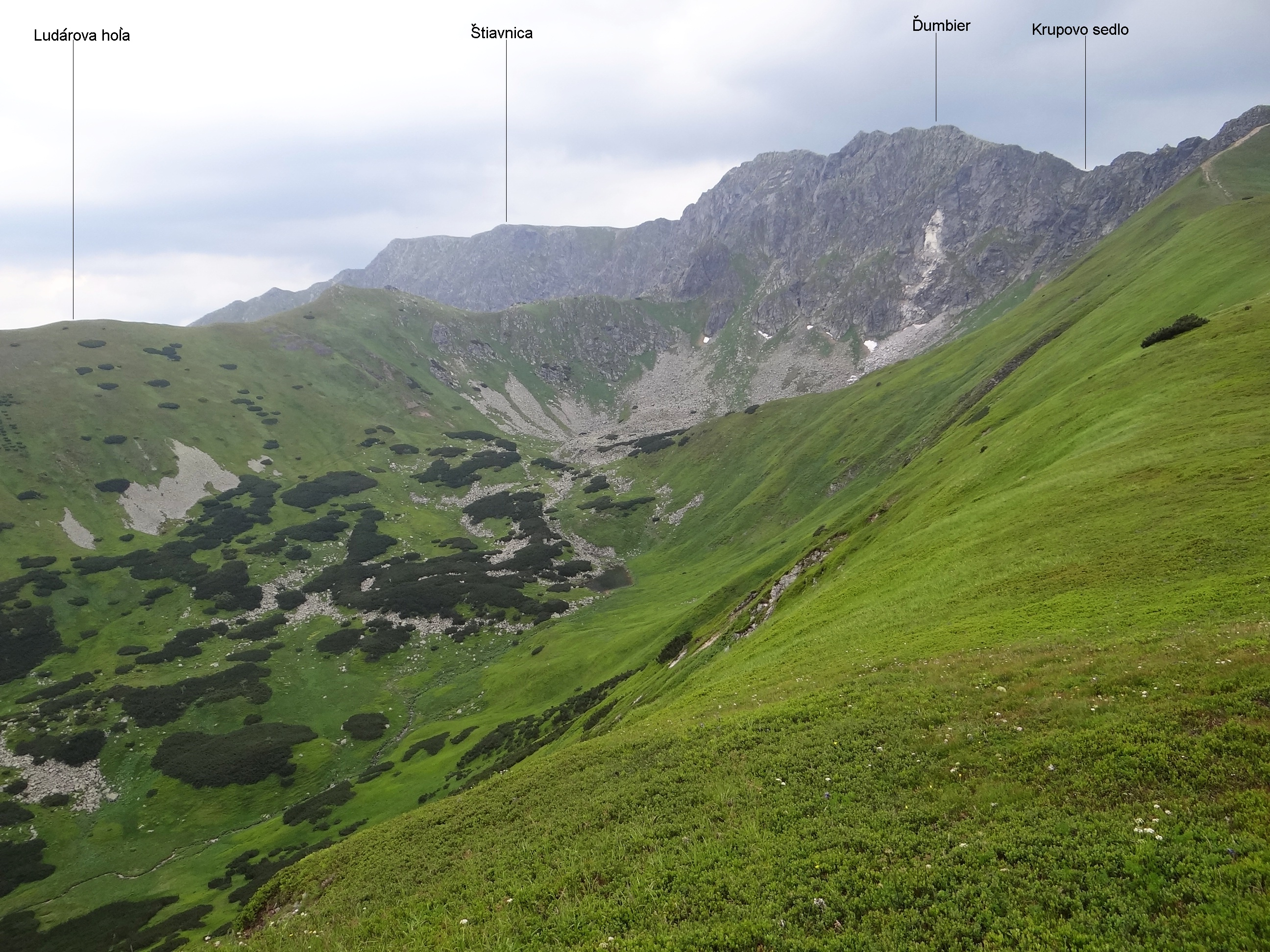 Widok z grzbietu Ďumbier - Prašiva